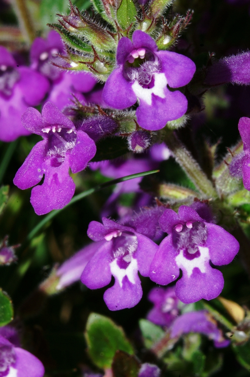 Alpski čober na Otlici.